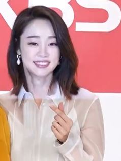 180809 KBS 2TV 새 월화드라마 '러블리 호러블리' 제작발표회